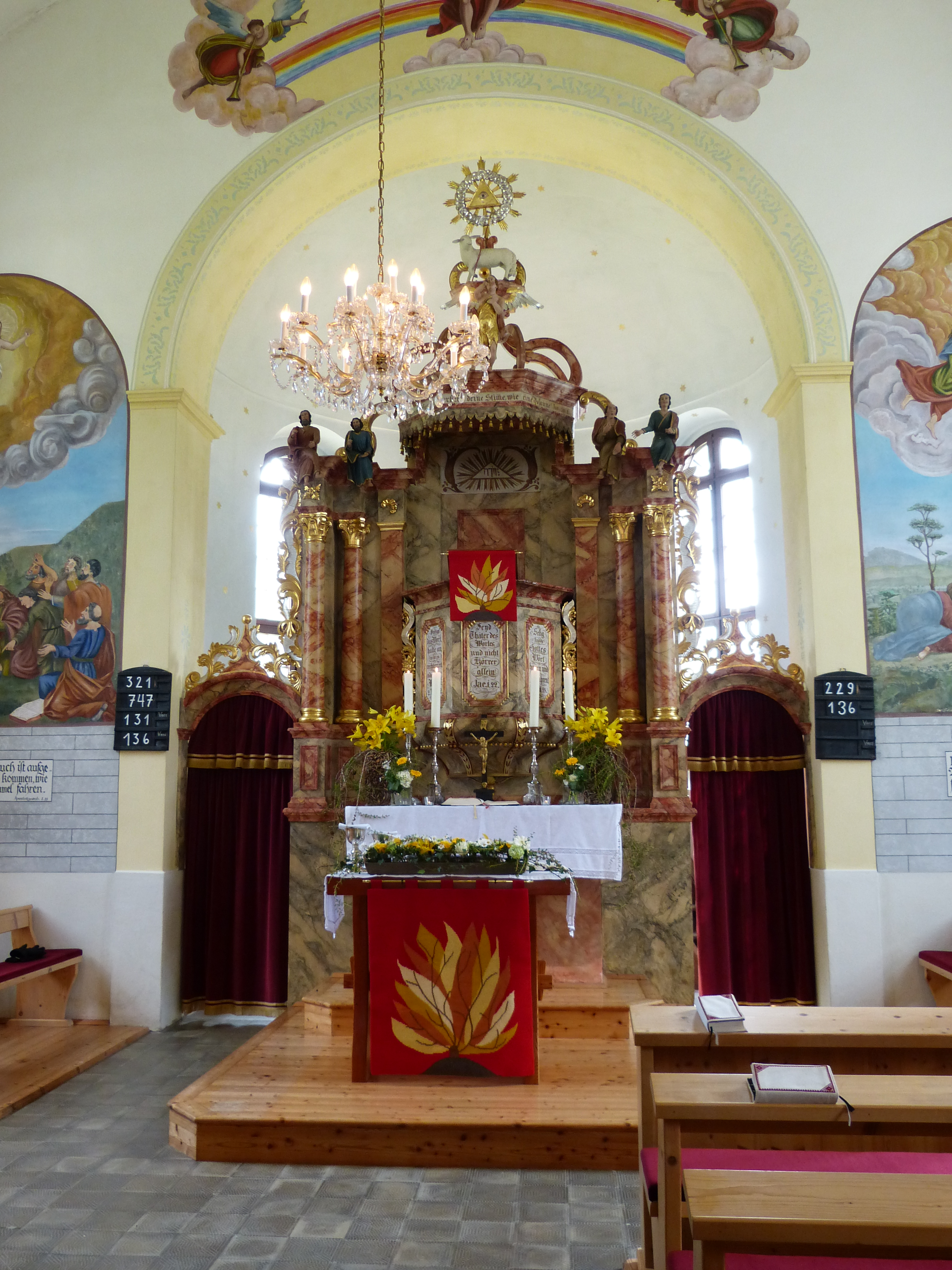 Inneres der Evangelischen Kirche Wiedweg, Gemeinde Reichenau, Kärnten